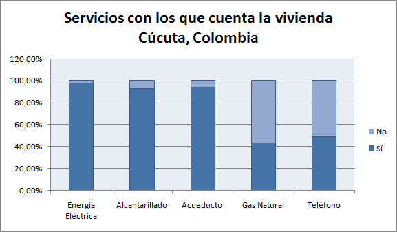 Servicios con los que cuenta la vivienda - Cúcuta, Colombia